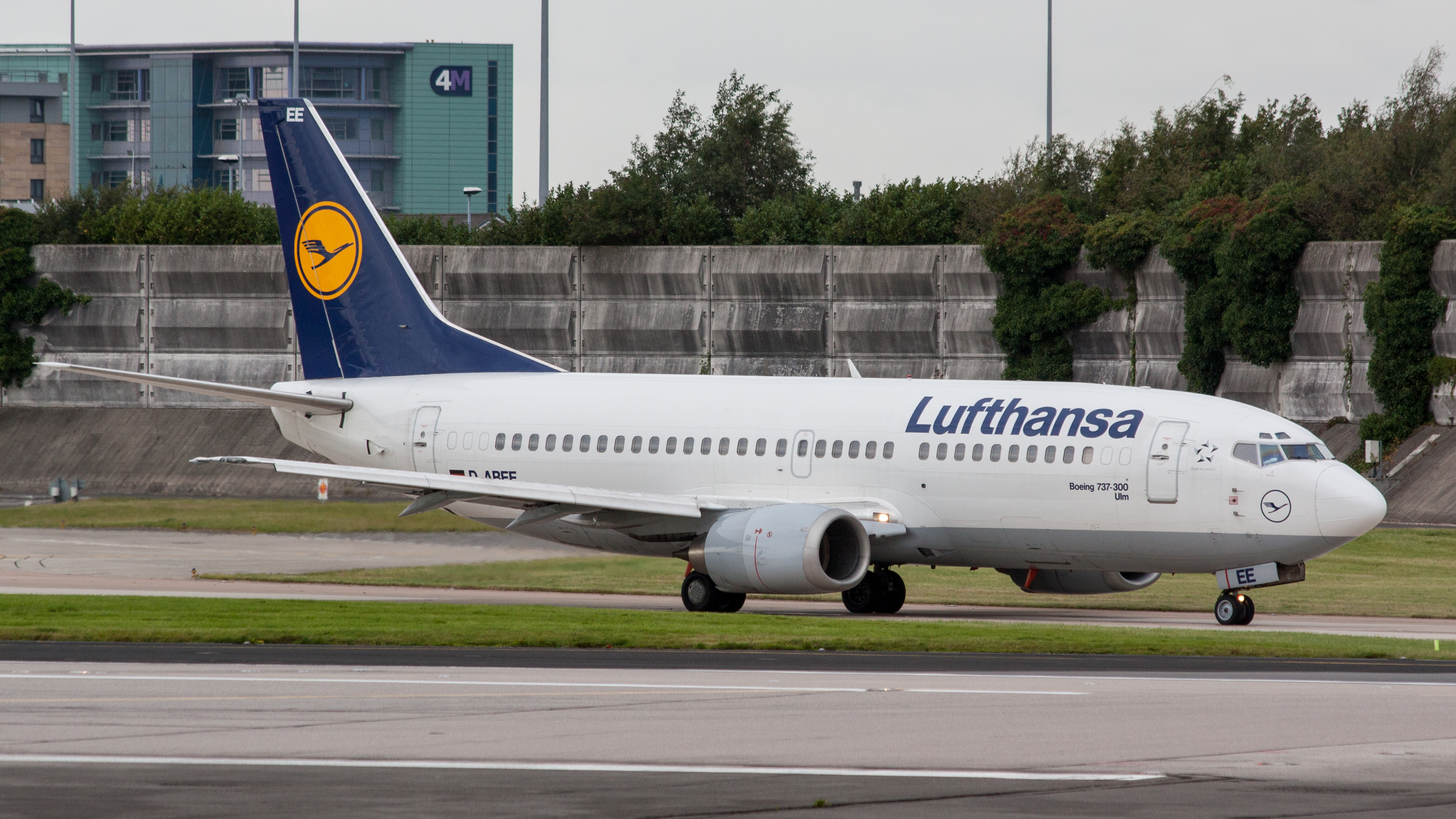 D-ABEE Lufthansa B737